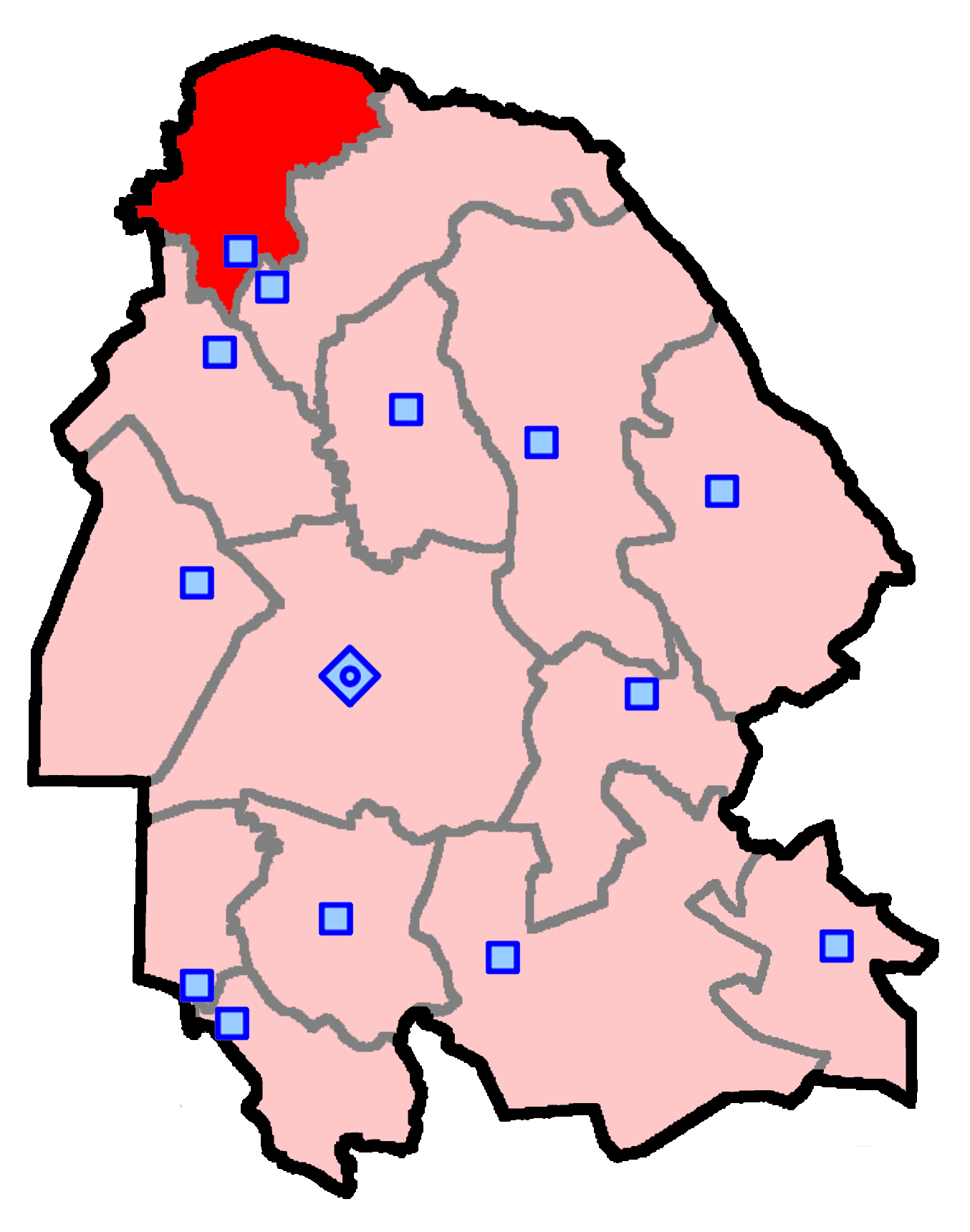 حوزهٔ انتخاباتی اندیمشک برای انتخابات مجلس شورای اسلامی